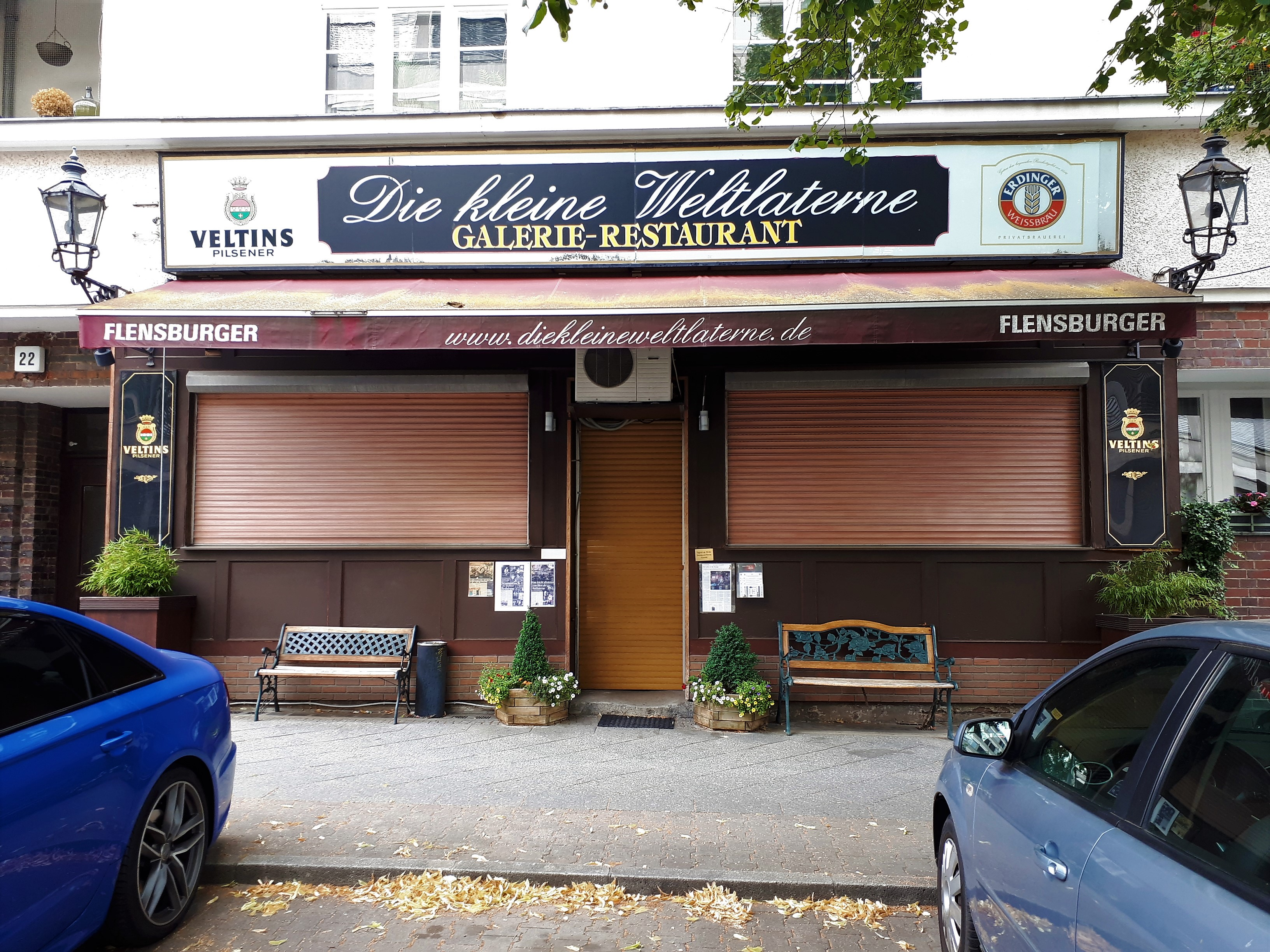 Halensee Nestorstraße Die kleine Weltlaterne